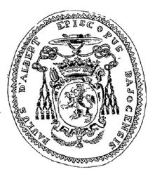 Sceau de Paul d'Albert de Luynes.